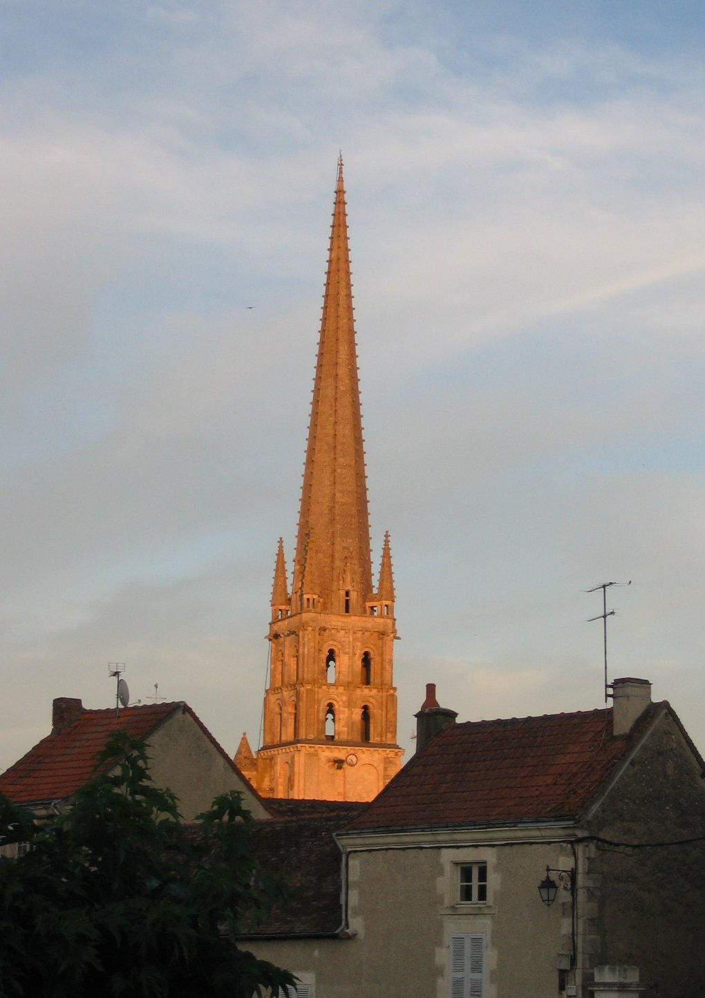 détail du clocher de l'abbaye de Saint-Savin-sur-Gartempe au soleil couchant.